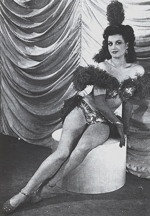 Ester Estéry (1915-2012)